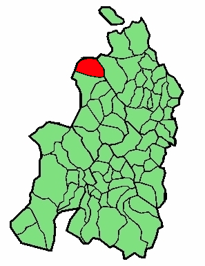 aipaturiko udalerriaren kokapena Nafarroa Beherean